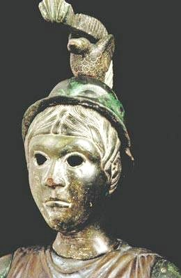 Brigitte, déesse du Ménez-hom, art celto-romain (1er siècle après JC)